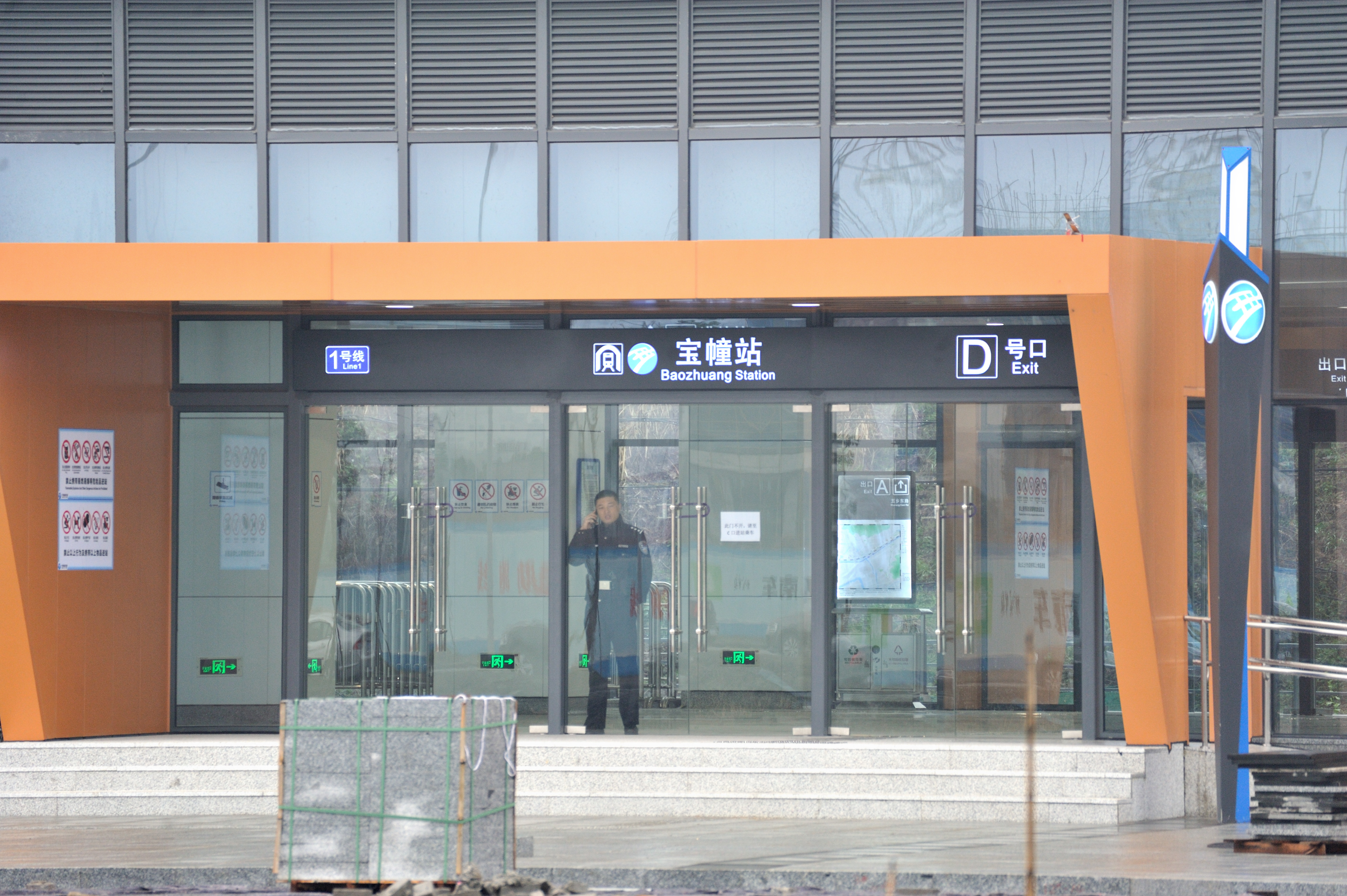 宝幢站D出入口